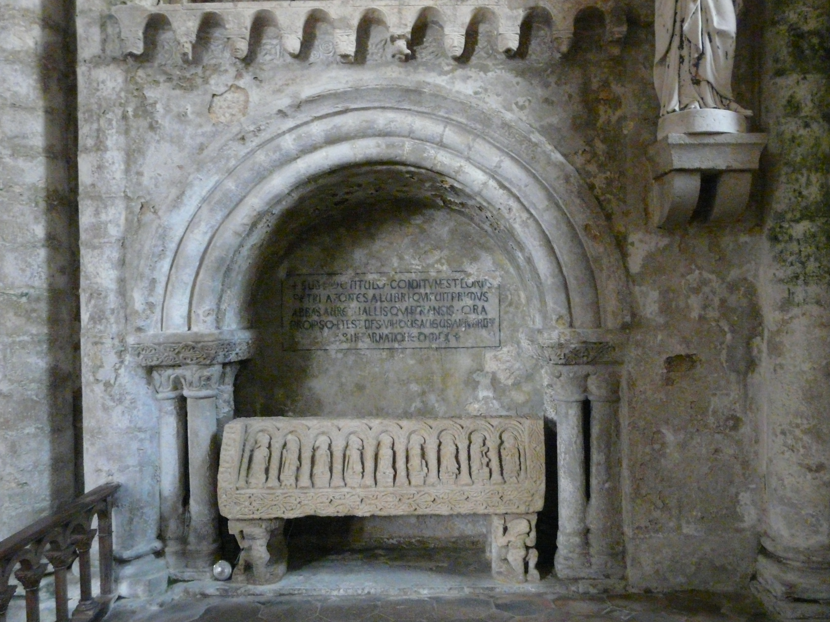 Le tombeau de Pierre de Saine-Fontaine, premier abbé de l'église abbatiale Saint-Pierre d'Airvault, Deux-Sèvres, France